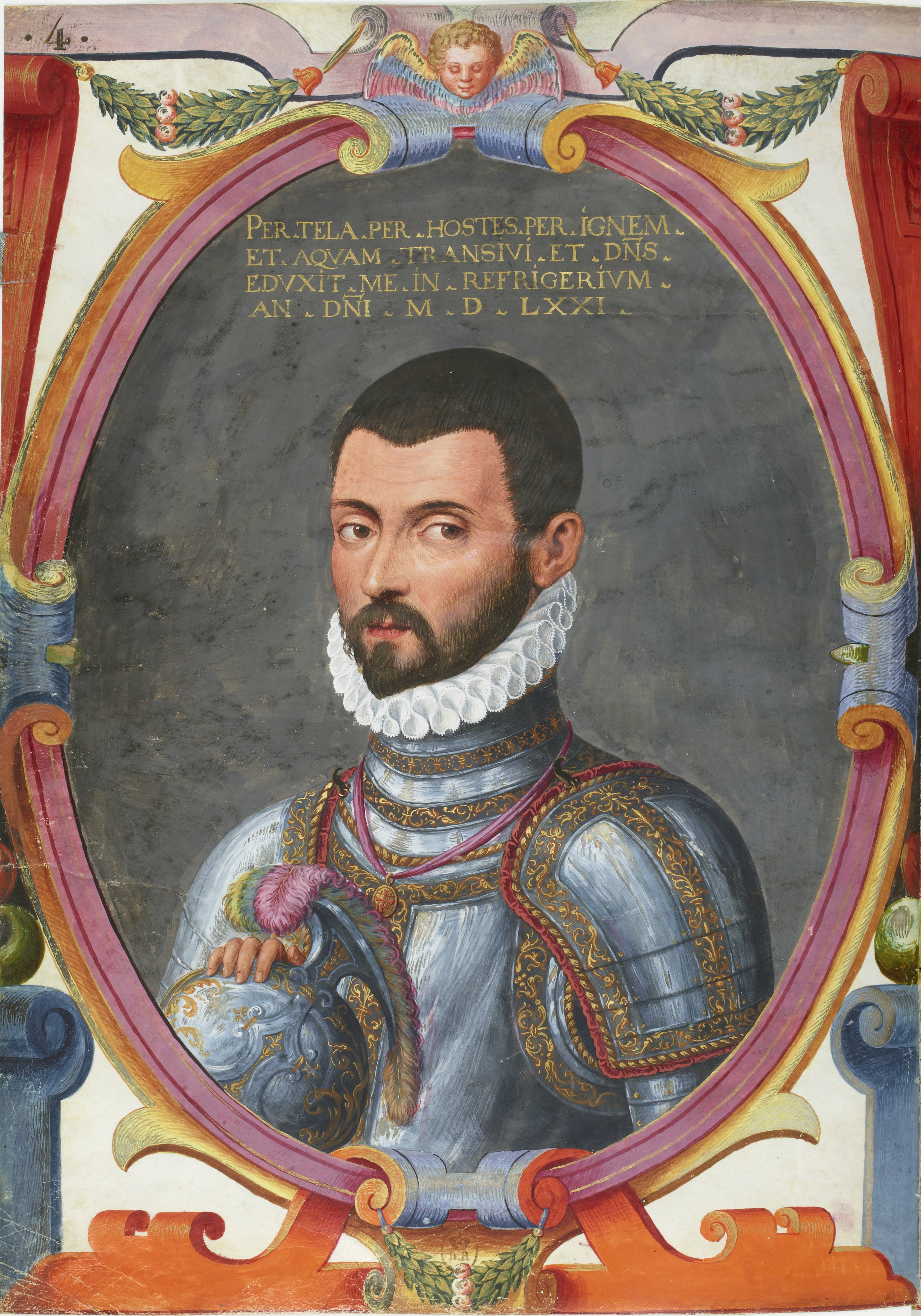 Voyages et aventures de Ch. Magius, Bibliothèque nationale de France, département Estampes et photographie, RESERVE 4-AD-134, miniature no. 4, Portrait de Charles Magius